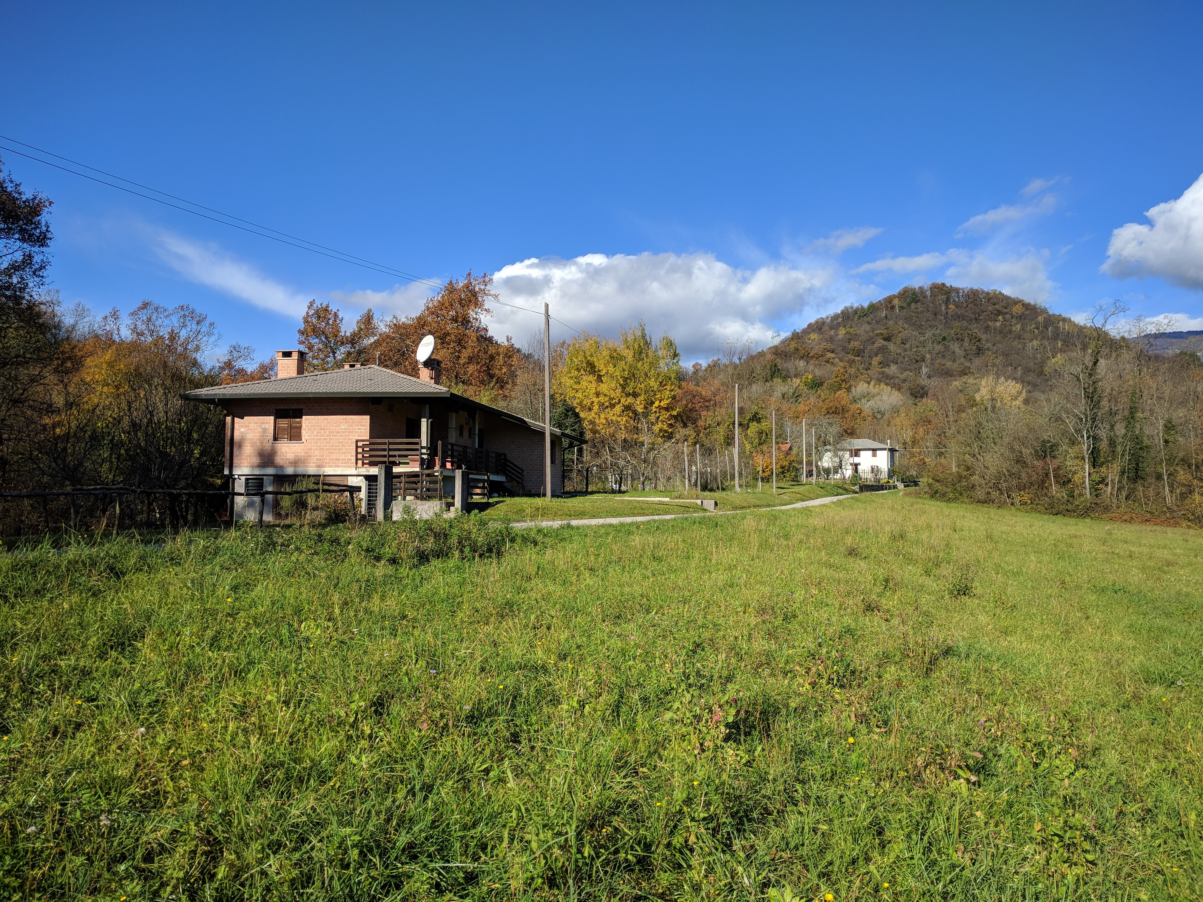 Località Cja Ronc, comune di Pinzano al Tagliamento (PN) - Italia